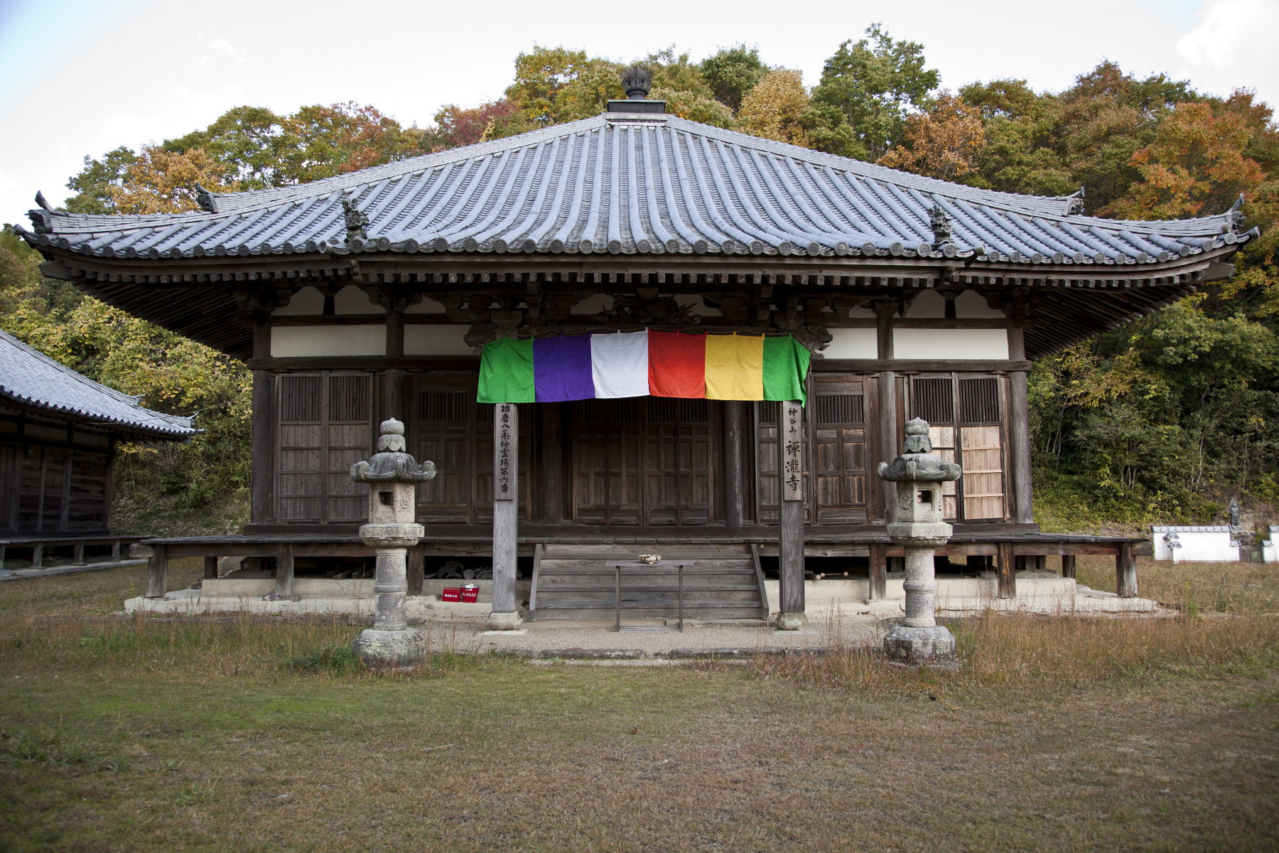 禅瀧寺